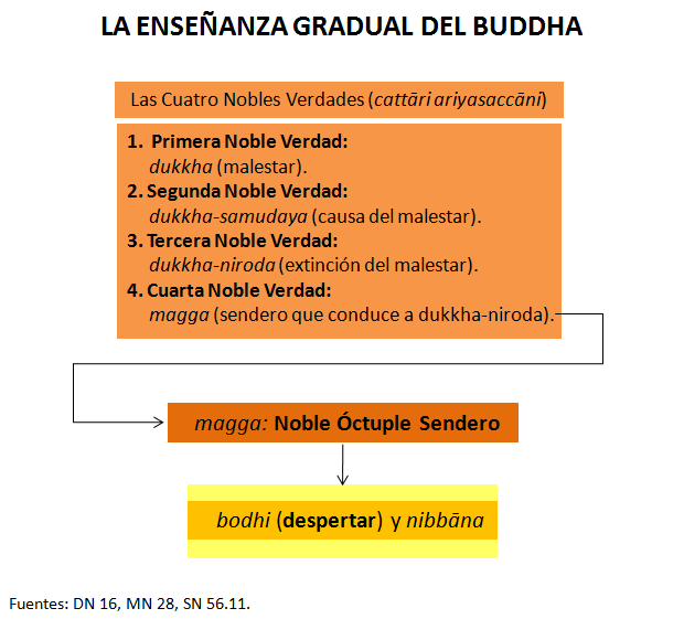 Las Cuatro Nobles Verdades enseñadas por Buddha.